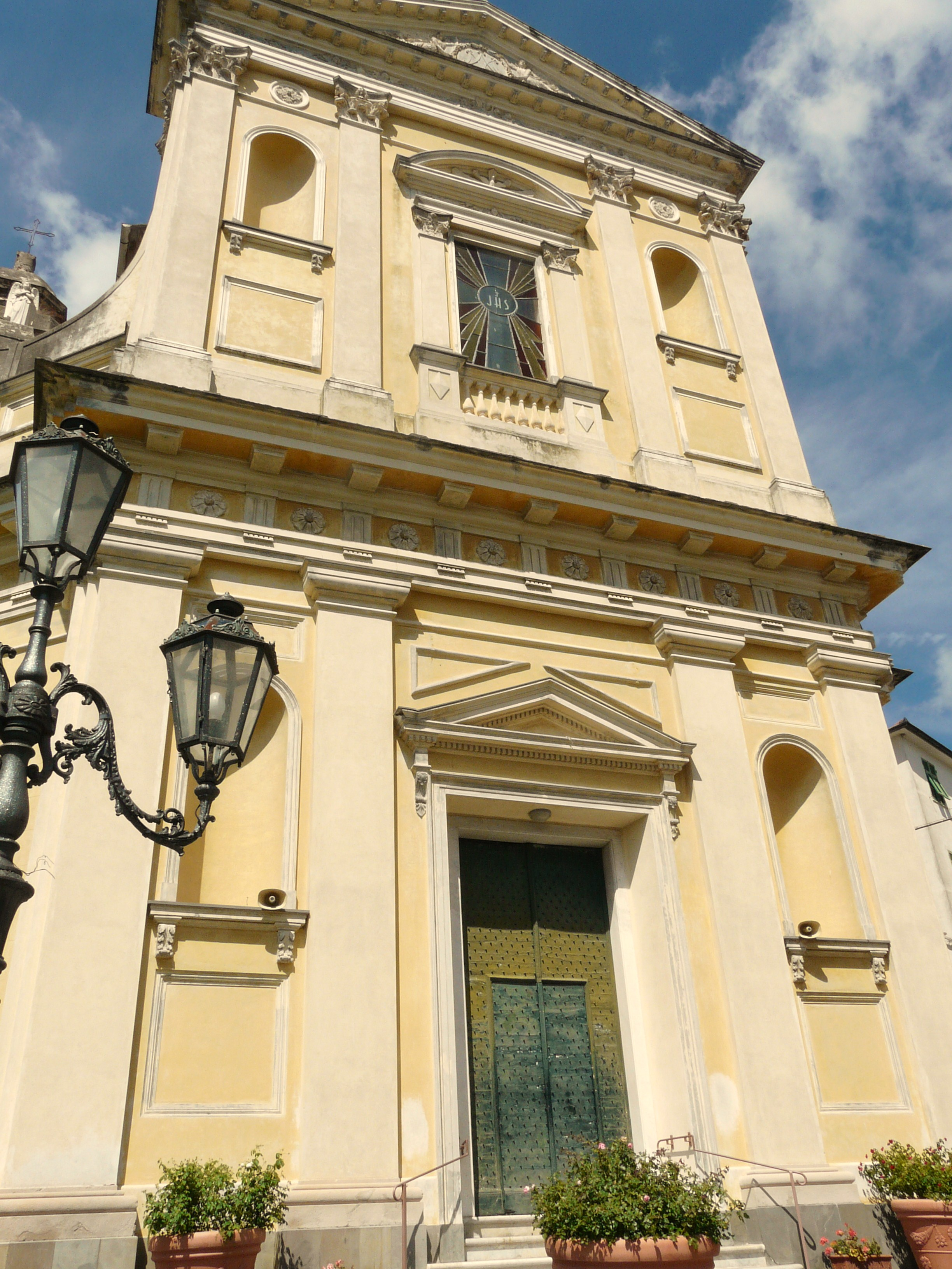 Chiesa di Sant'Antonio abate, Deiva Marina, Liguria, Italia